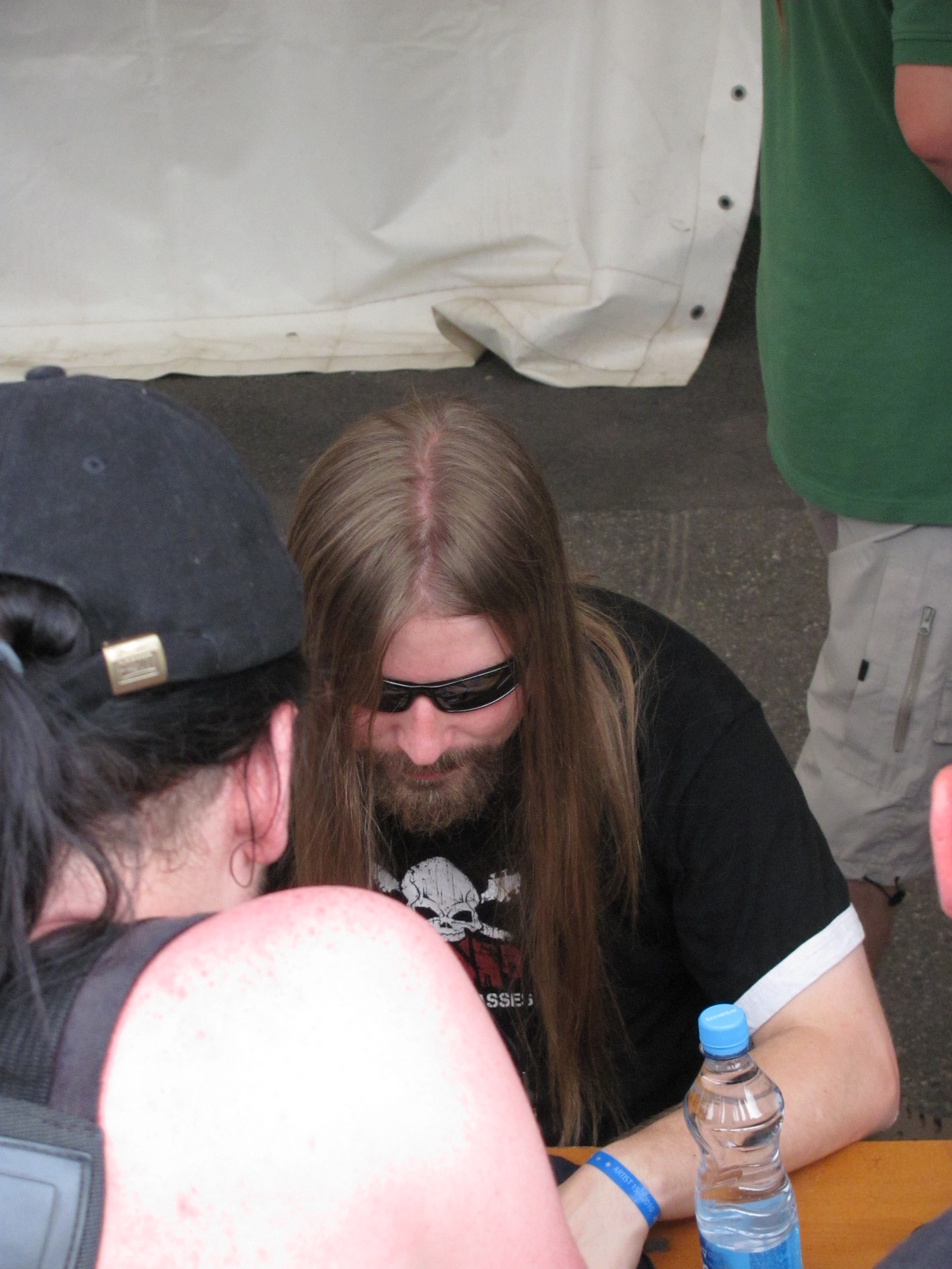 Pär Sundström, Sabaton, Prosperita stage, Masters of Rock 2010